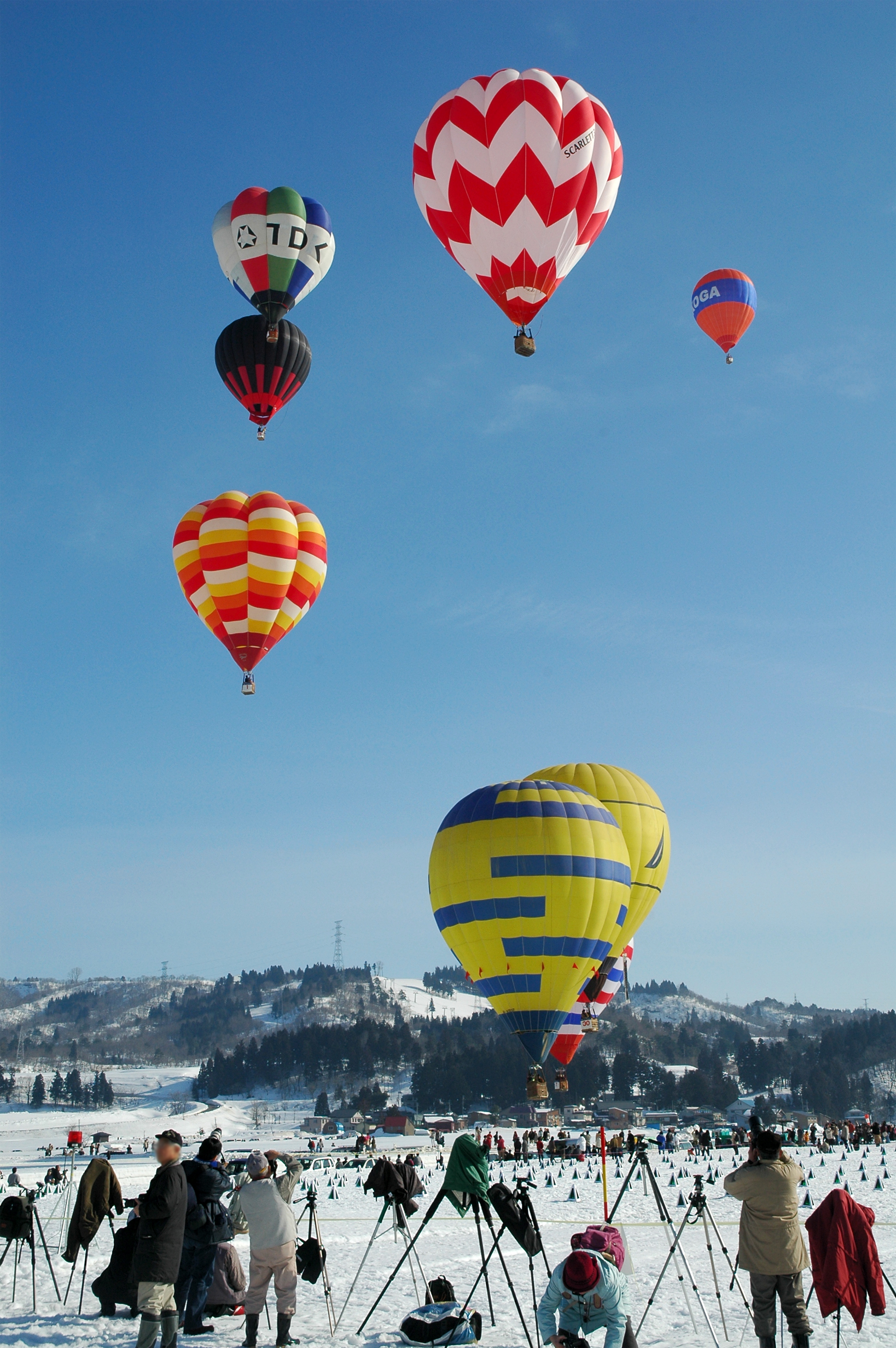 2006 Ojiya Balloon Festival (2006年おぢや風船一揆)